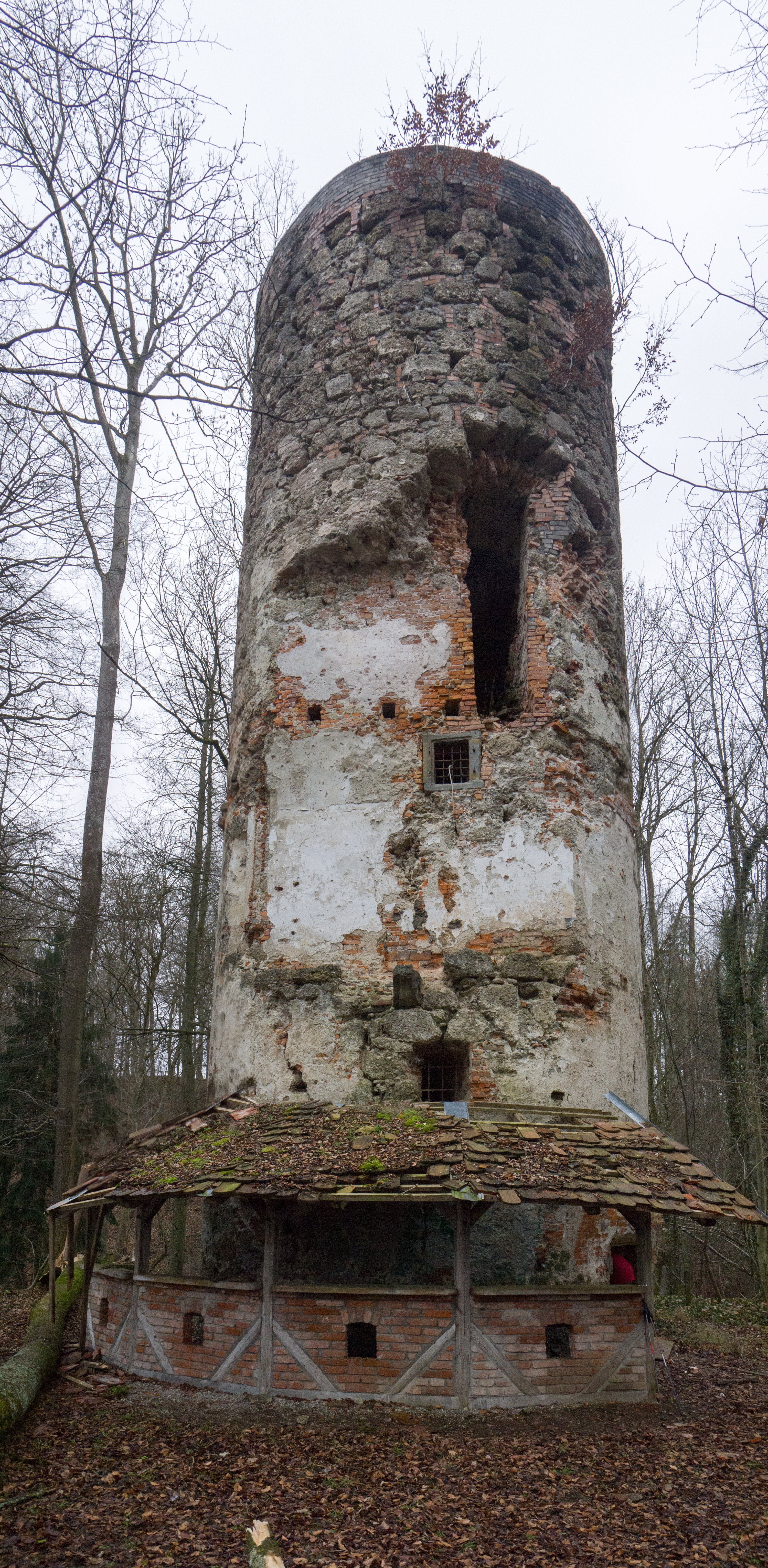 Altwartenburg samt Turm